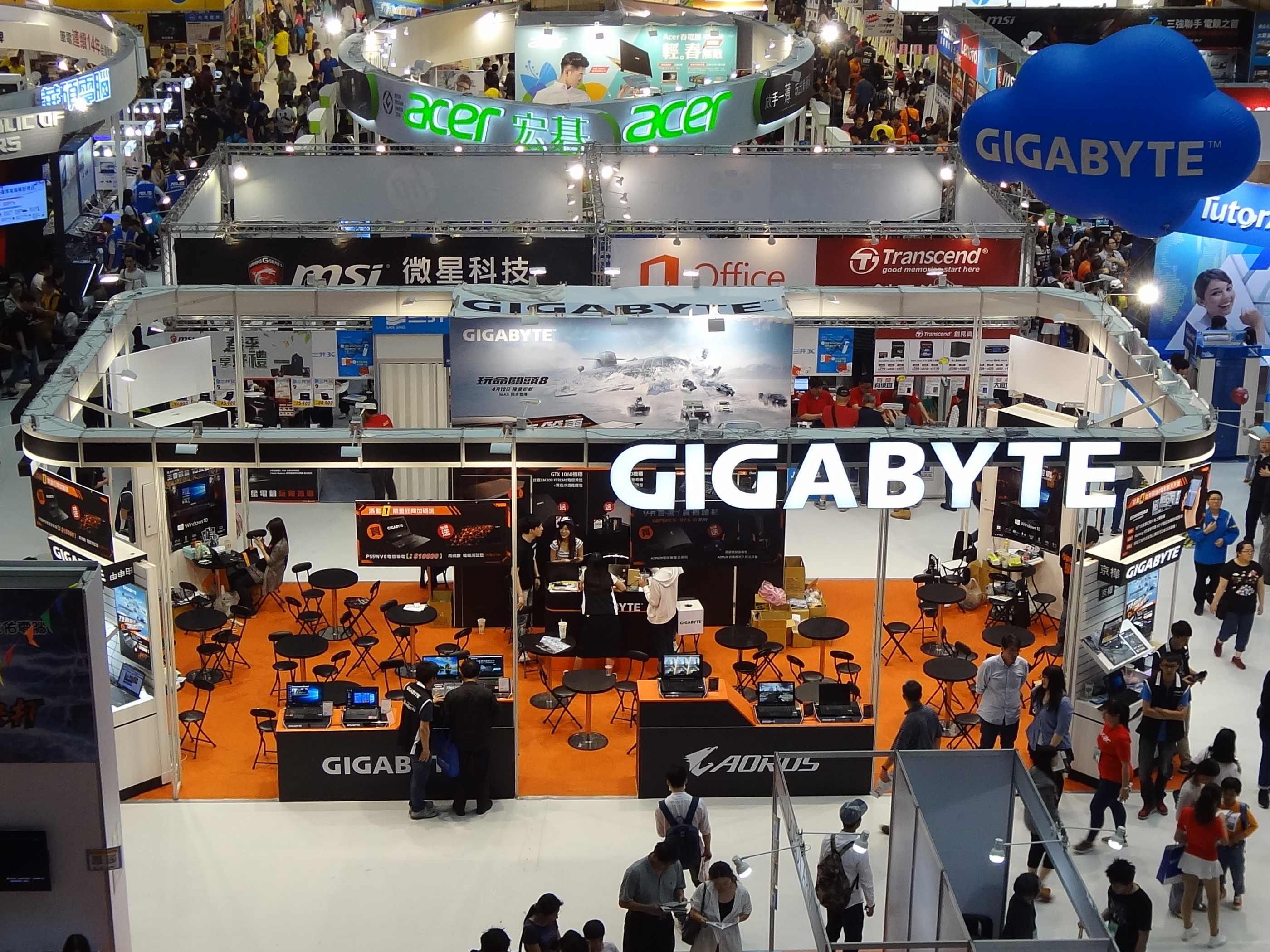 2017台北春季電腦展，技嘉科技攤位。